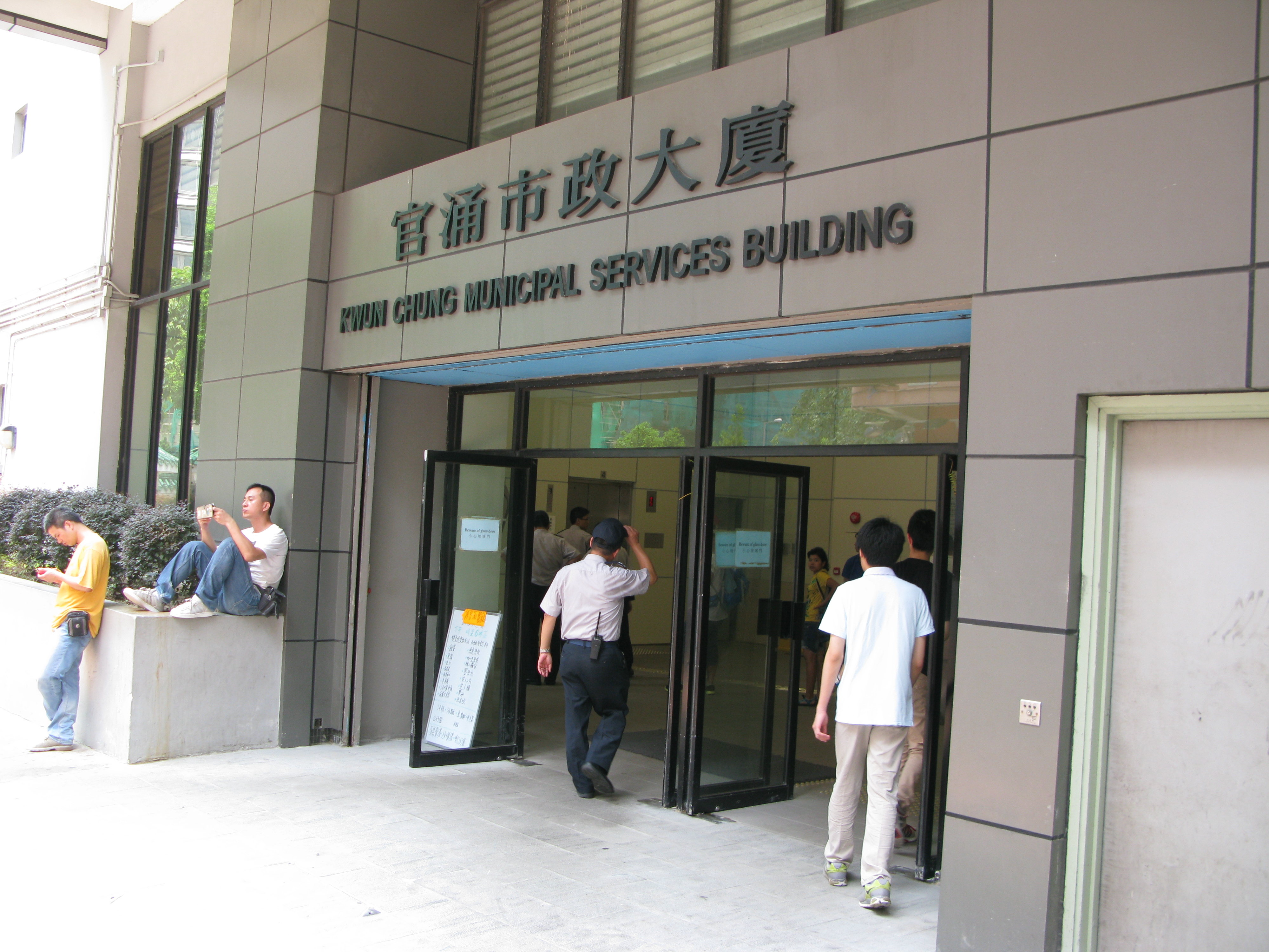 官涌體育館地面正門入口